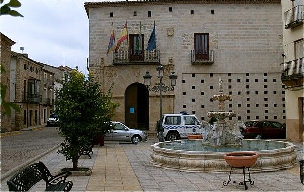 Casa Consistorial de Castellar (Jaen)